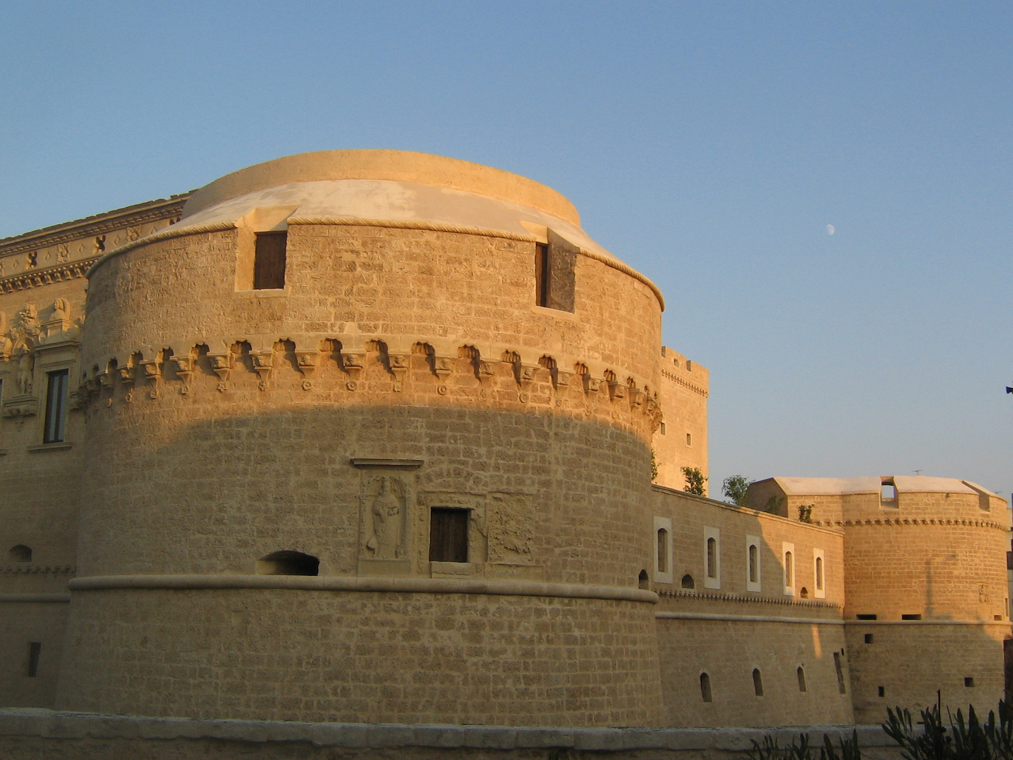 Castello di Corigliano Vista Laterale.jpg